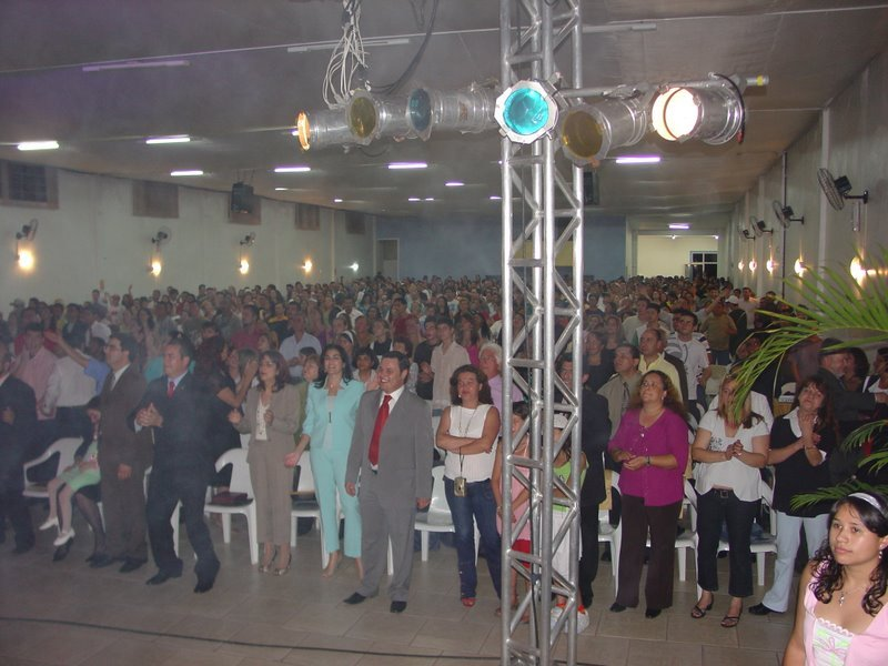 7º Aniversario da Igreja Evangélica Templo das Águias